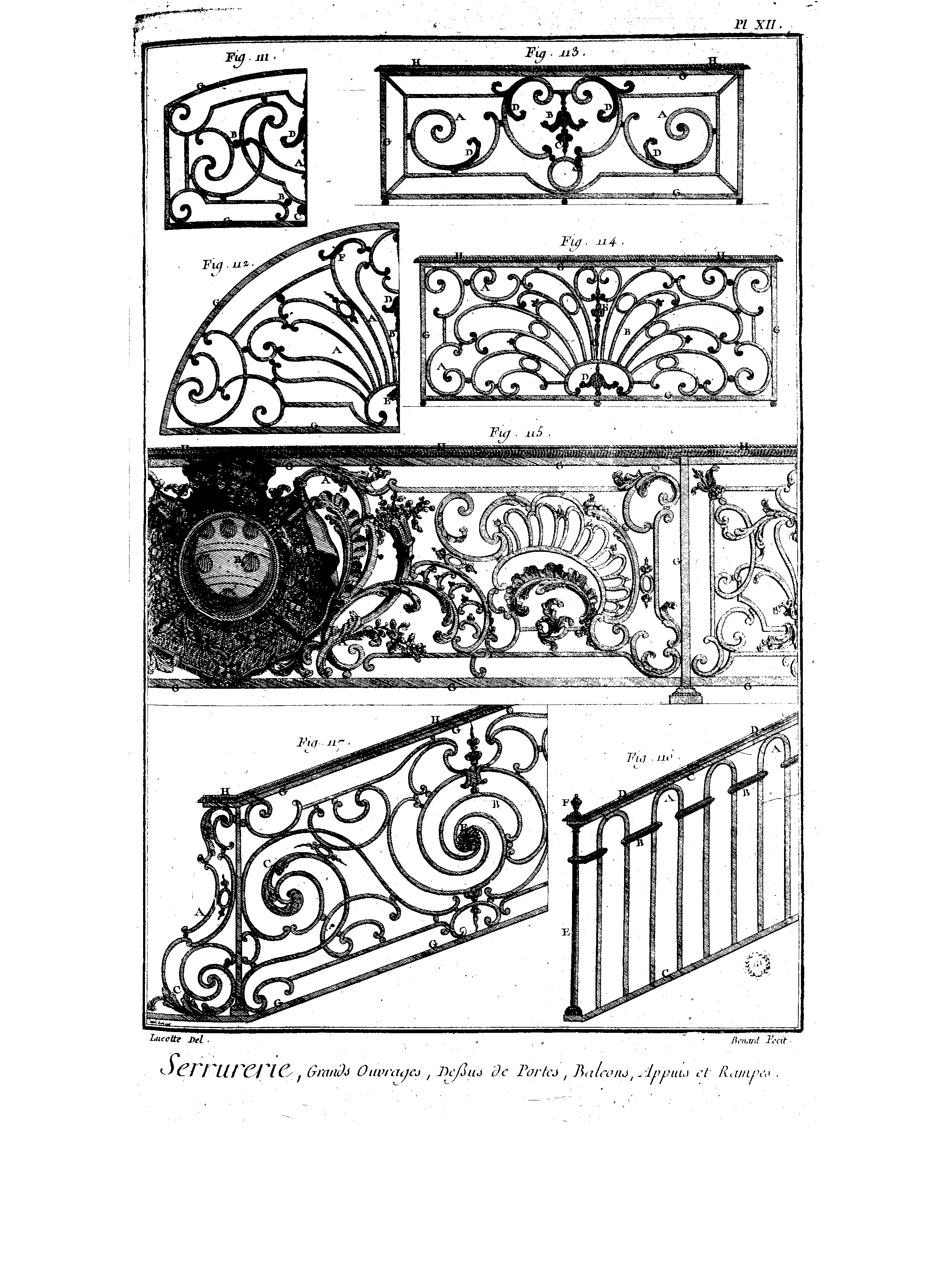 Serrurerie, Grands Ouvrages, Dessus de Portes, Balcons, Appuis et Rampes Planches de l'Encyclopédie de Diderot et d'Alembert, volume 8